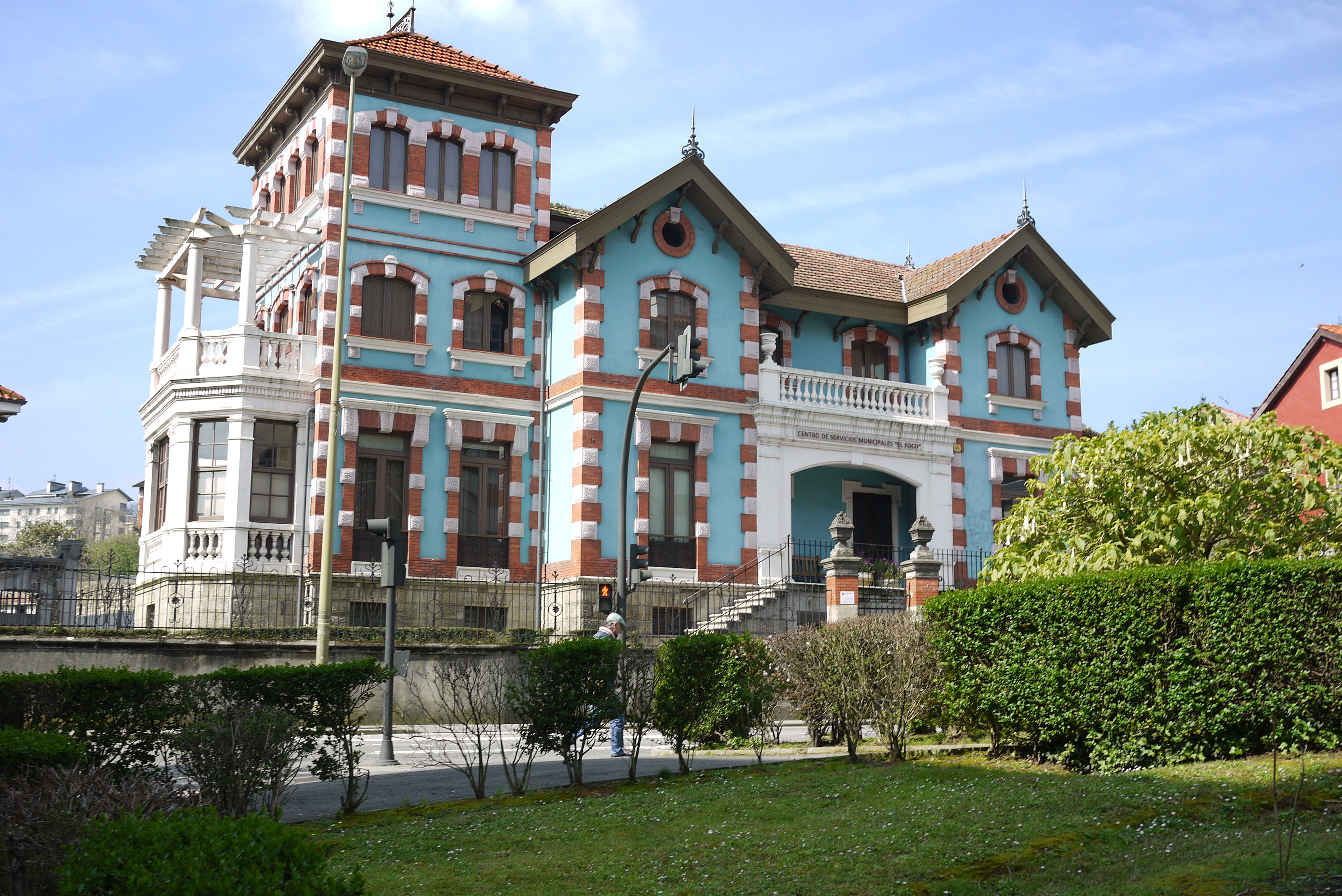 Villalegre (Avilés, Asturias).